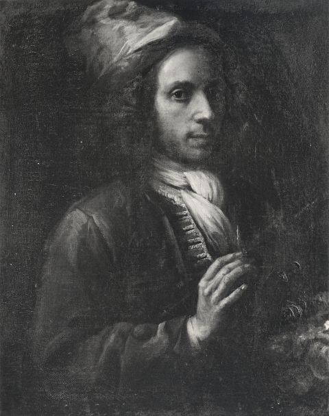 Autoritratto di Giovanni Francesco Bagnoli Galleria degli Uffizi, depositi (Palazzo degli Uffizi) olio su tela 73 x 58,5